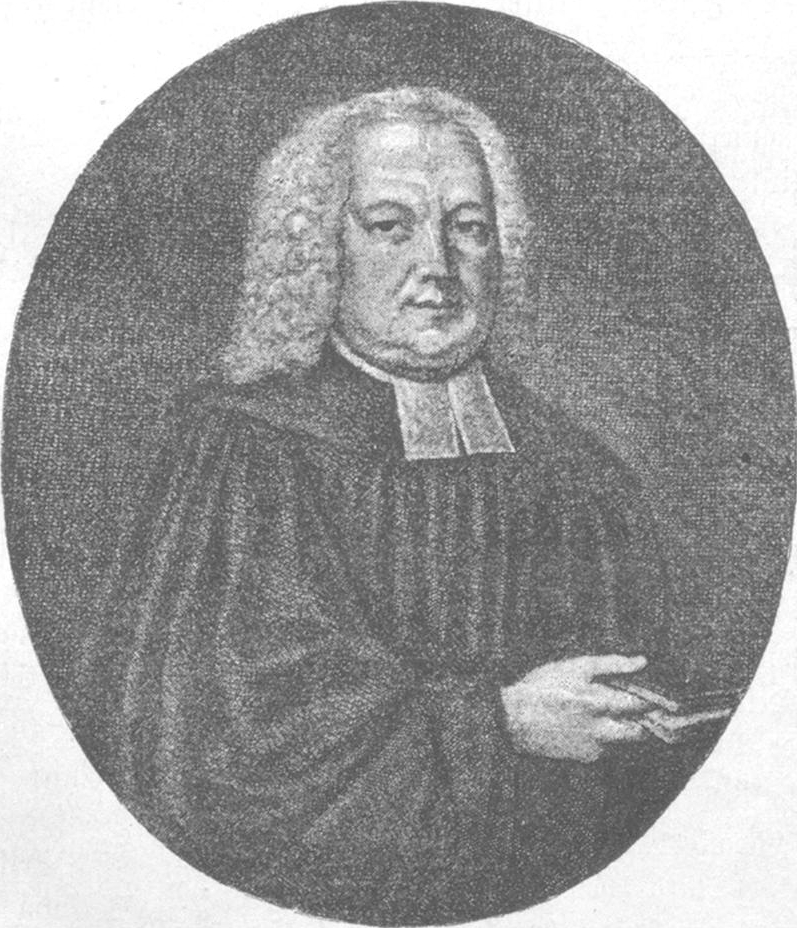 Porträt von Georg Konrad Rieger.